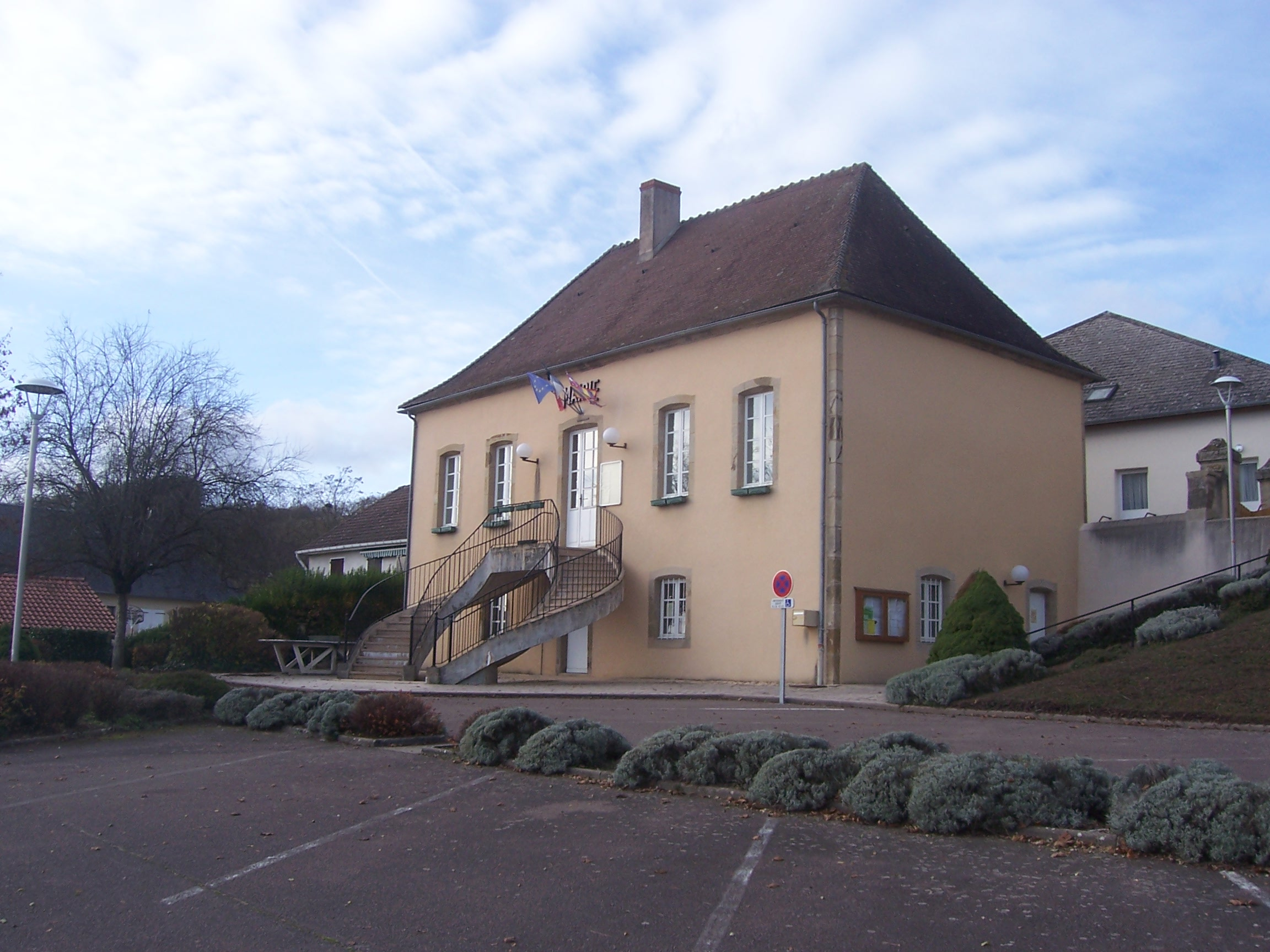 Mairie de Reclesne